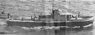 ספינת משמר אח"י גליה